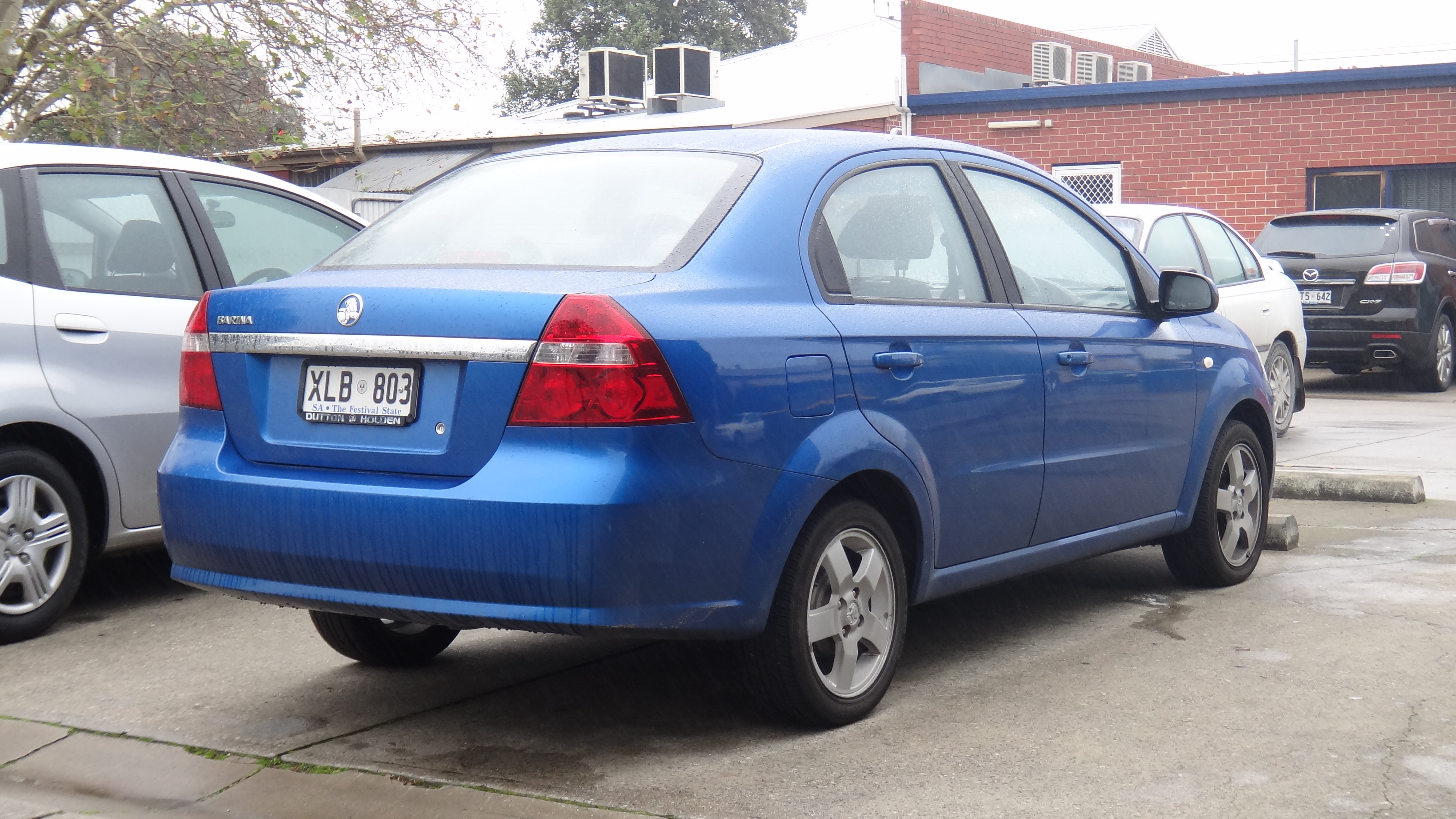 2006 Holden Barina (TK) sedan